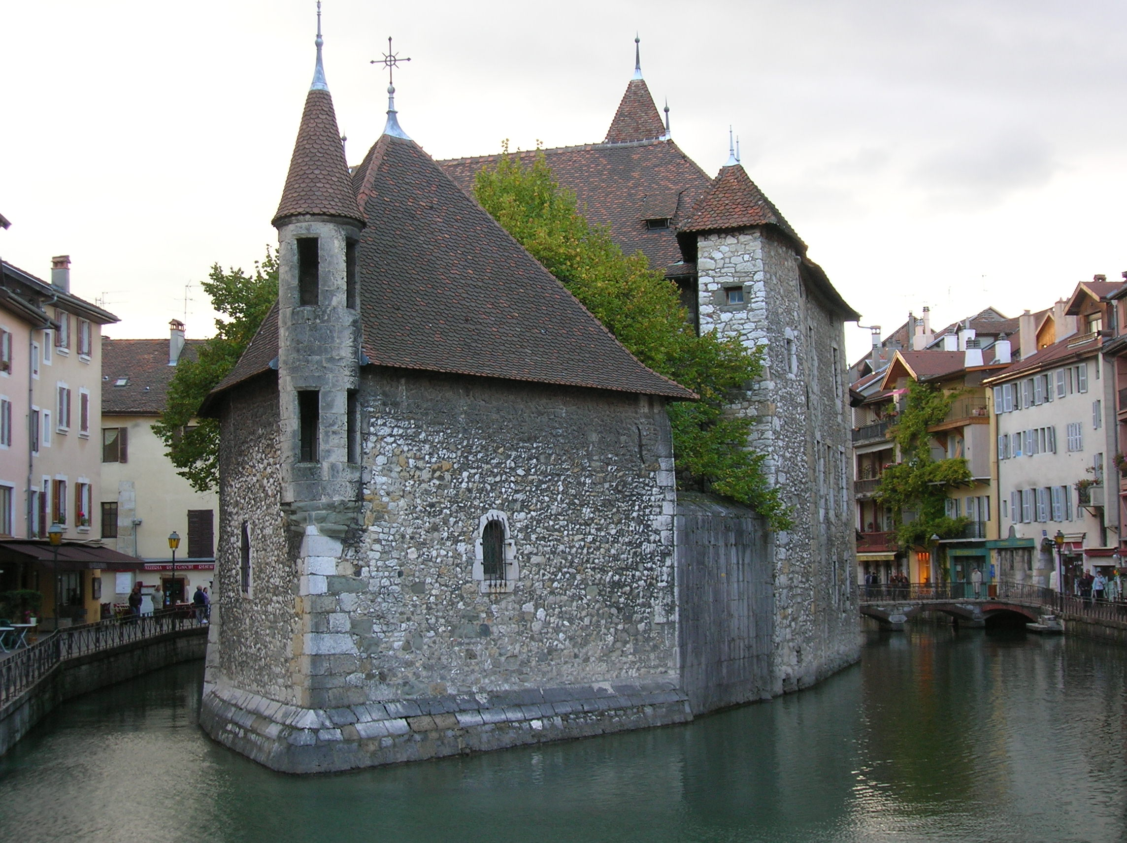 Vielles prisons, Annecy, France (civic museum)